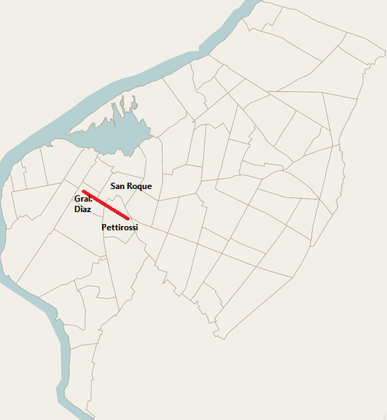 Tramo de la Avda Rodriguez de Francia en Asunción, Paraguay